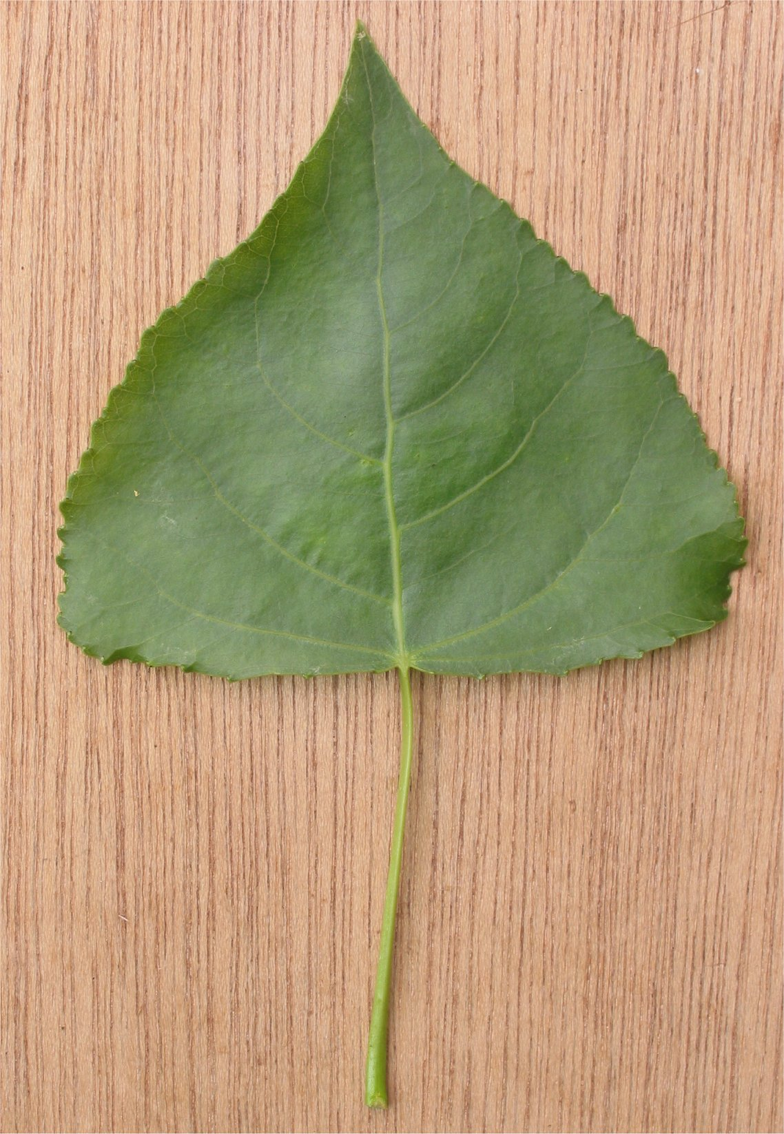 (nl: Italiaanse populier driehoekigblad) Populus nigra 'Italica' leaf